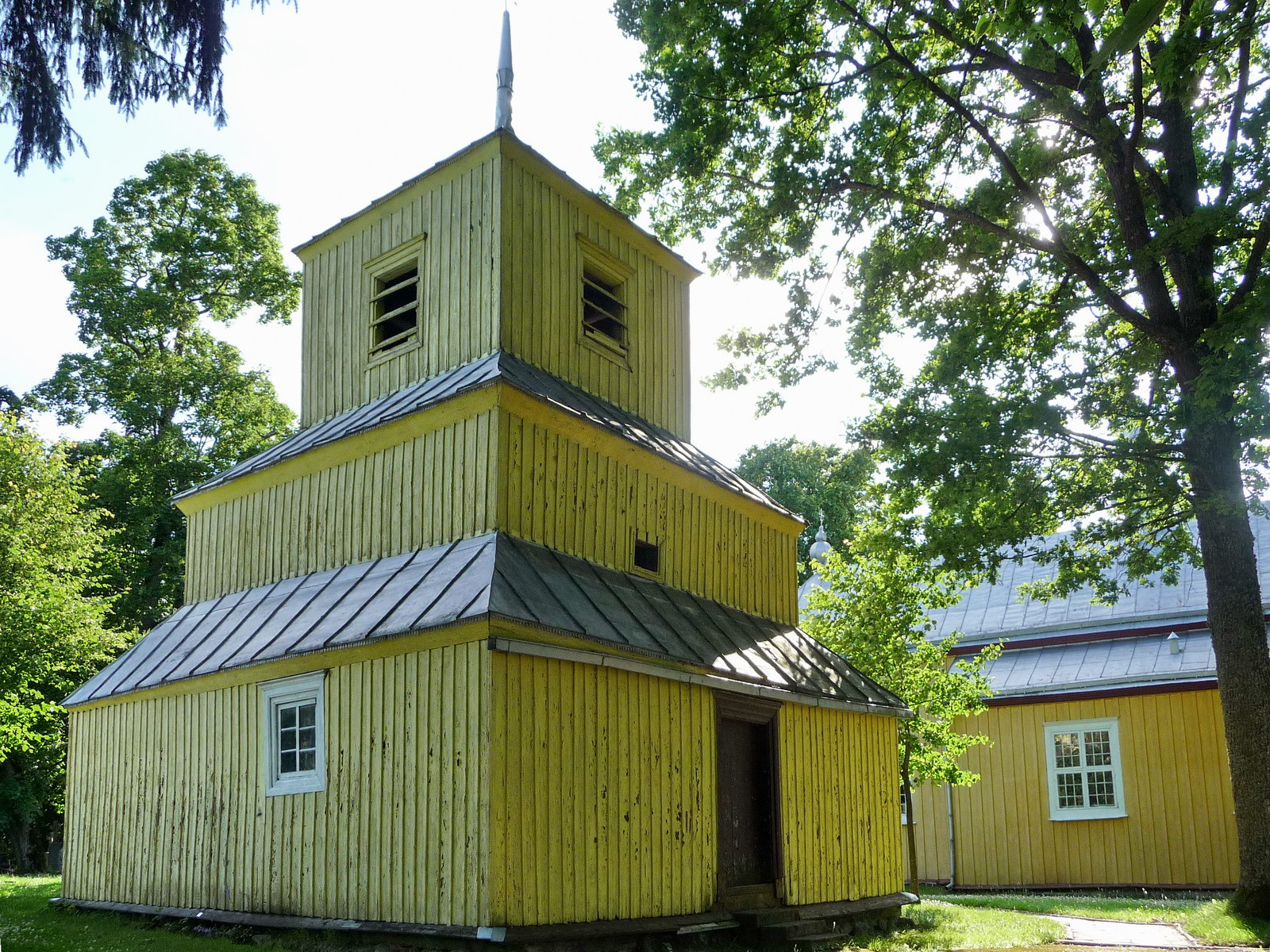 Ilguvos Šv. Kryžiaus Atradimo bažnyčios varpinė